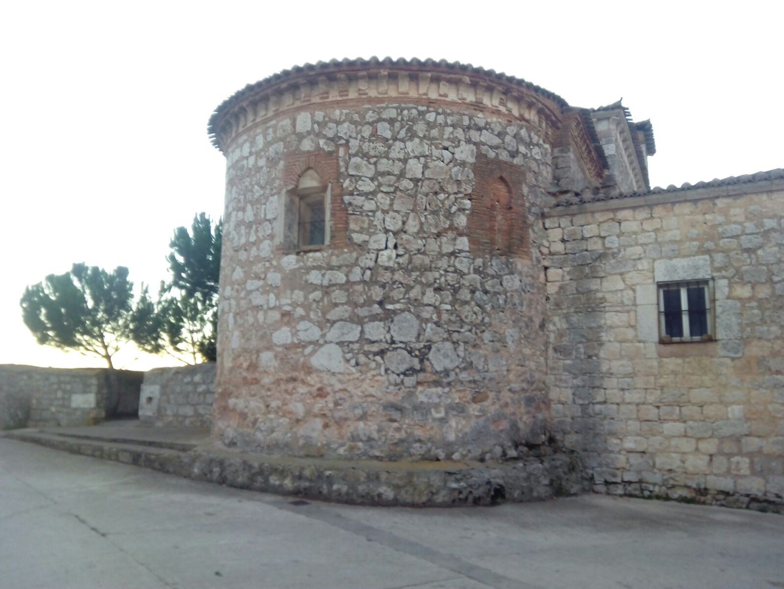 Abside de la iglesia de Medinilla de la Dehesa